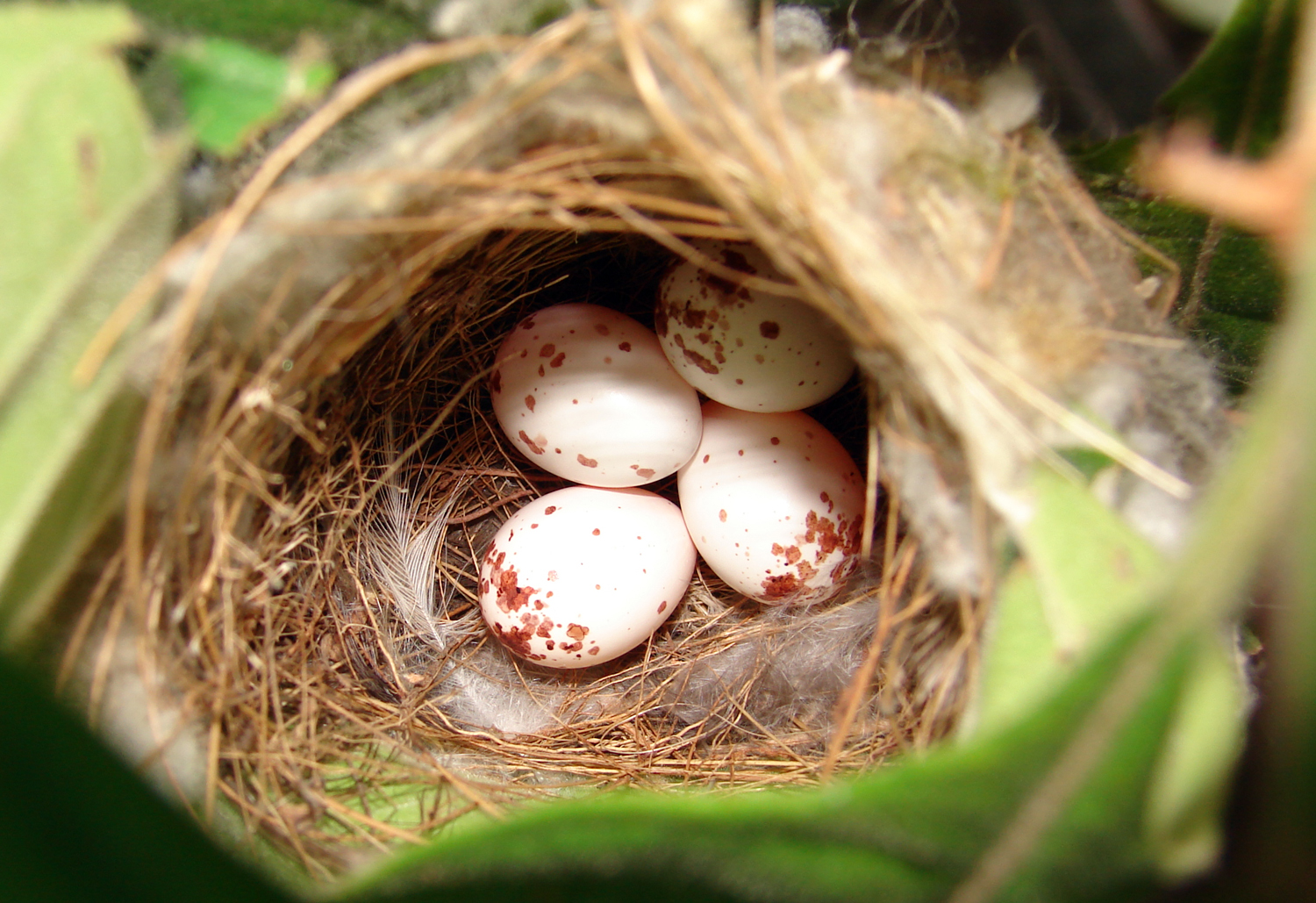 கூட்டின் உள்ளே தையல்சிட்டின் முட்டைகள்